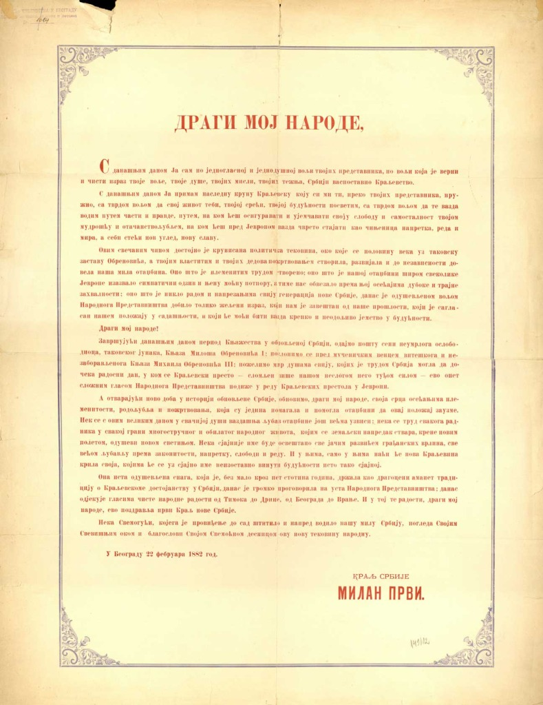 Proklamacija Milana Obrenovića o preuzimanju krune